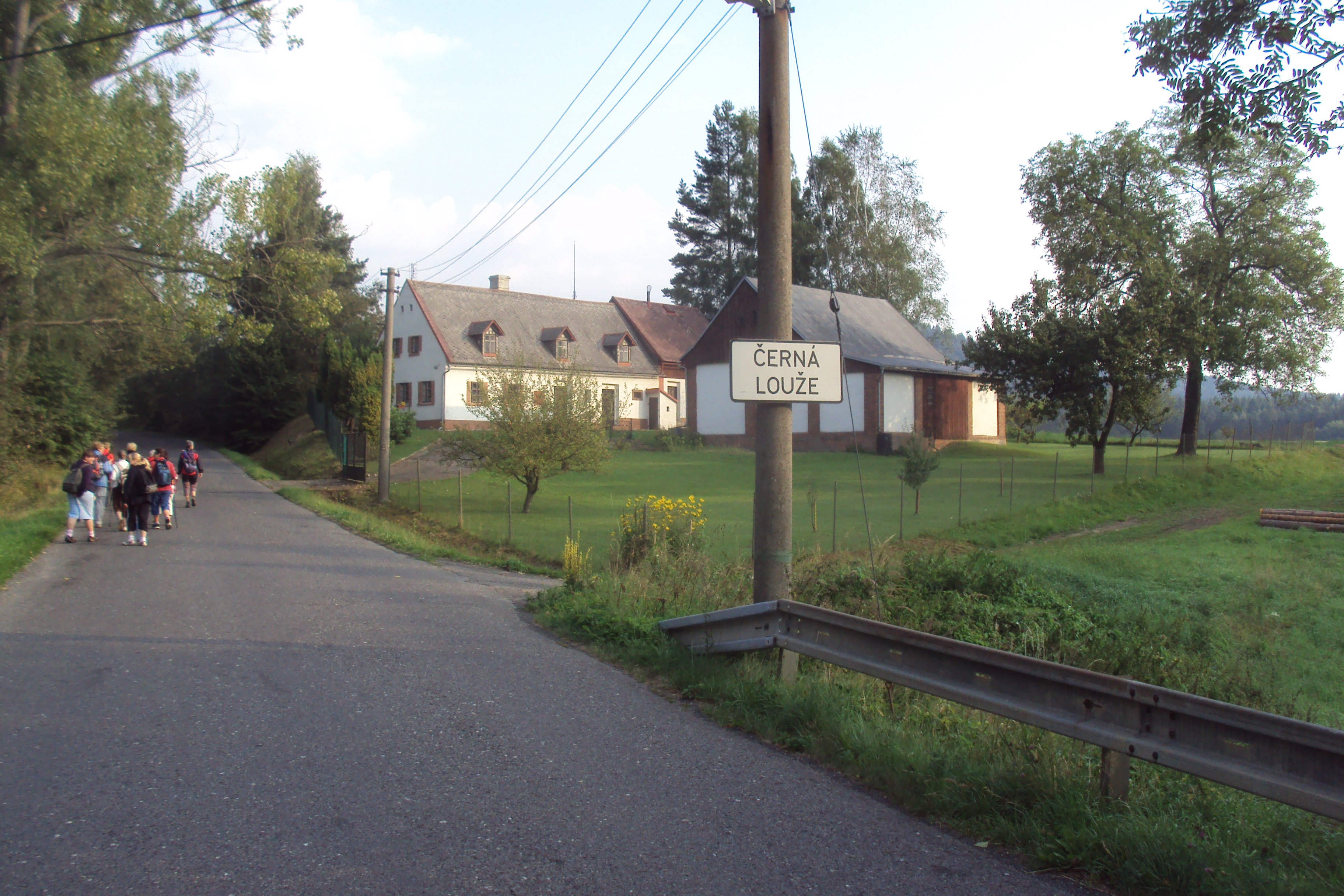 Začátek osady patřící pod Rynoltice